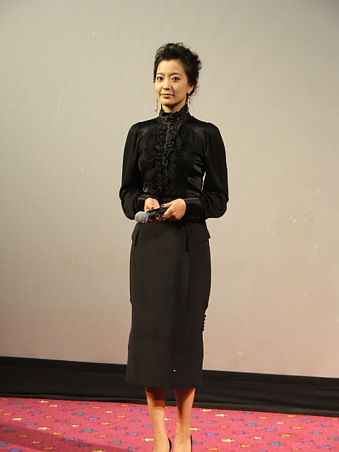 2006년 9월 1일 서울 CGV 용산에서 열린 ‘2006 CJ중국영화제’ 개막식에 참석한 홍보대사 김희선.